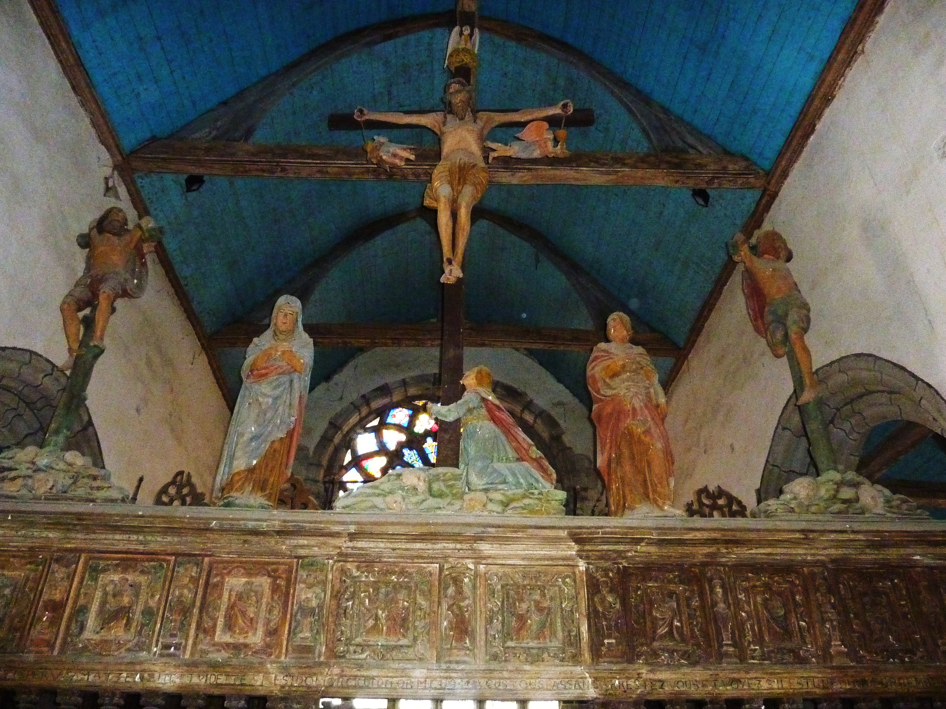 Saint-Herbot (Plonévez-du-Faou): église Saint-herbot, poutre de gloire au-dessus du chancel